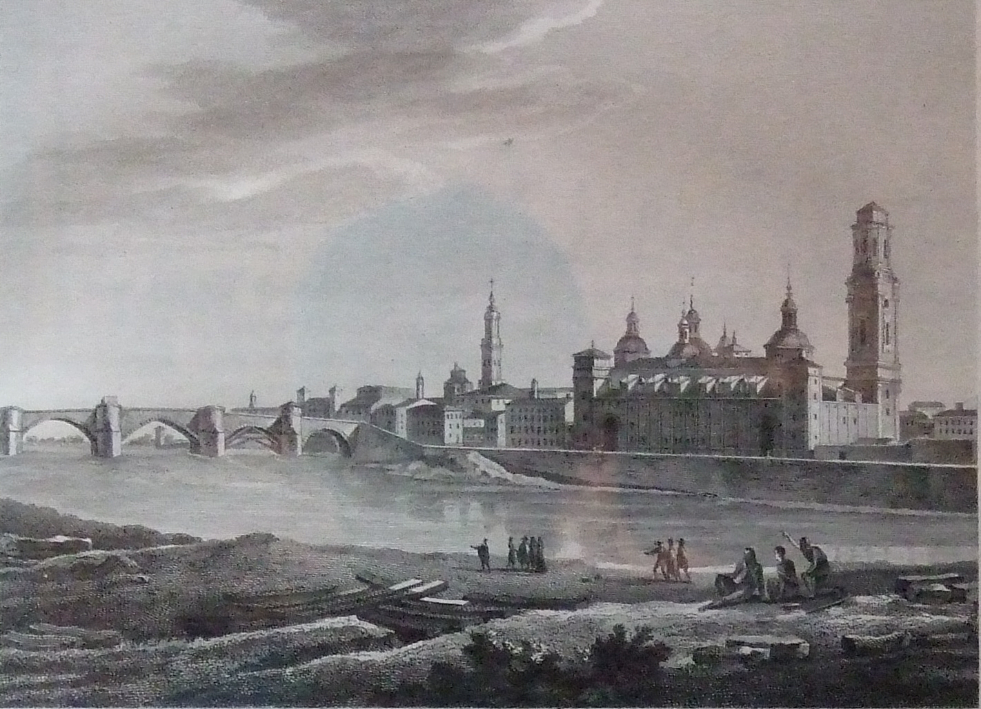 Templo de Nuestra Señora del Pilar (1806) Autores Louis François Lejeune (dib.) y Robert Daudet (grab.) Colección Alejandro Rincón, Zaragoza